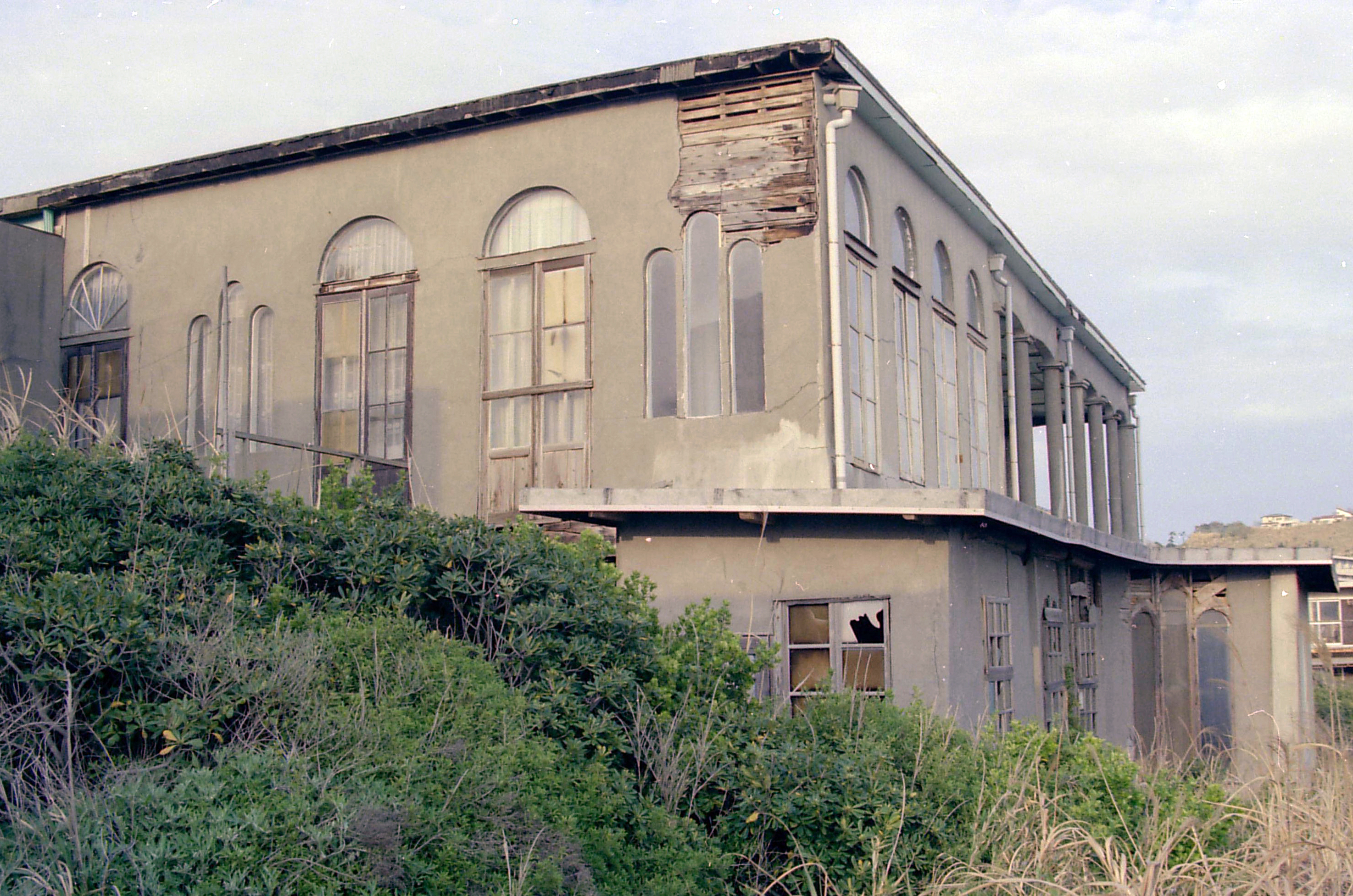 Eliana Pavlova house 16MAR1979